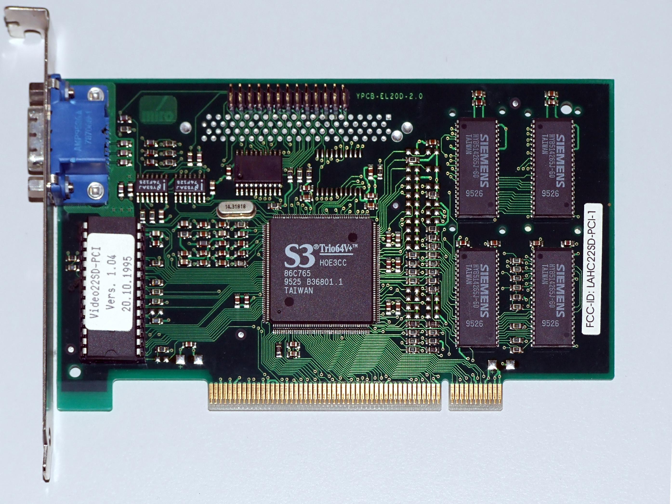 PCI-Grafikkarte "„Crystal 22SD“" von Miro auf Basis von S3 Trio von 1995 mit Siemens-DRAM-Speicher